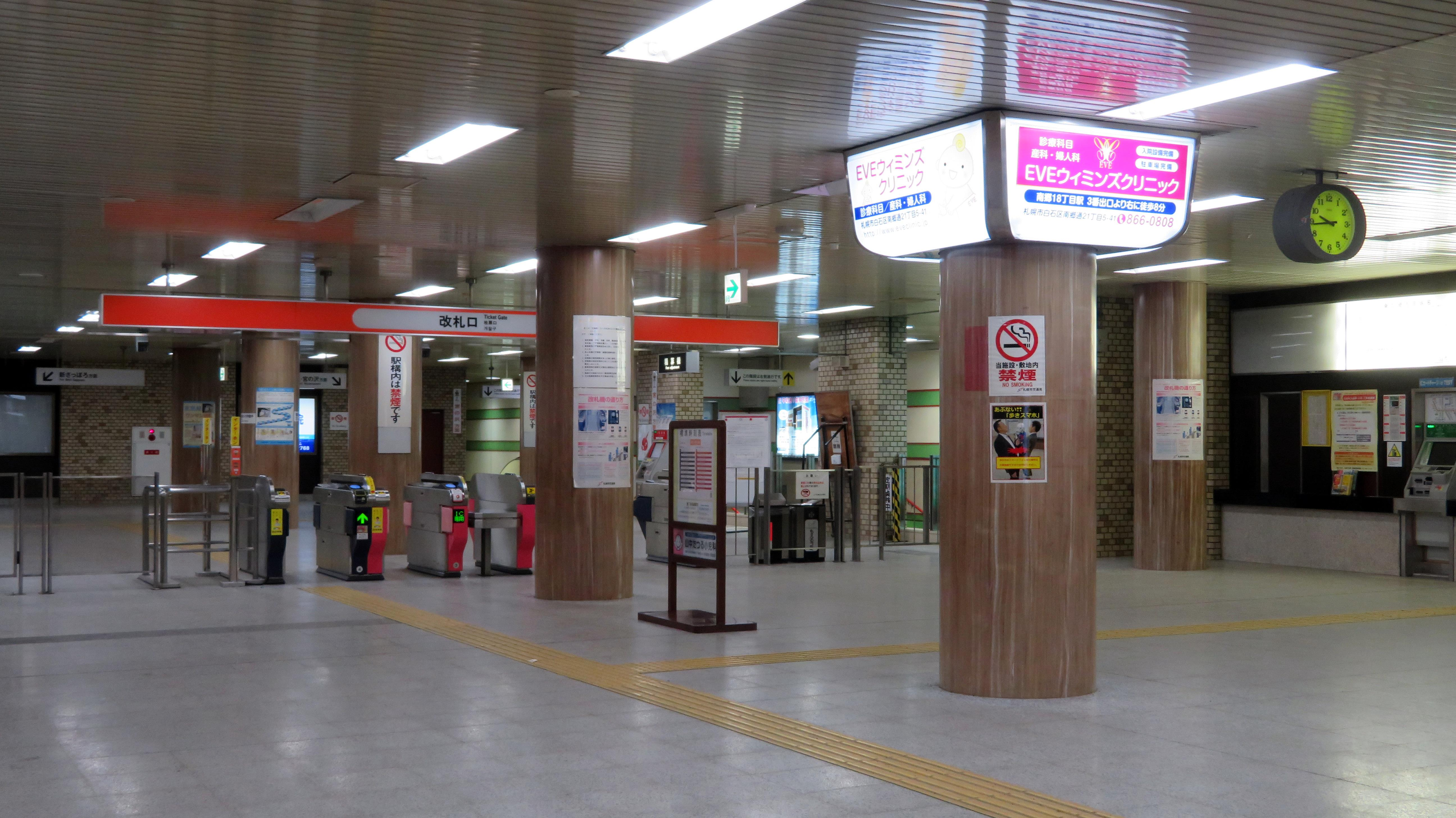 南郷13丁目駅改札口 Canon PowerShot SX720 HS